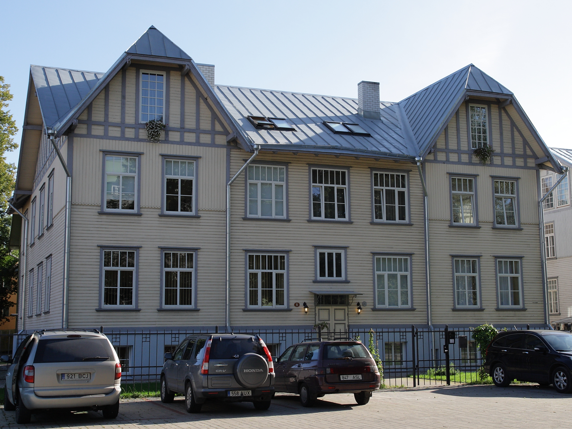 Tallinn, elamu F.R.Kreutzwaldi 5, 1910. aastad